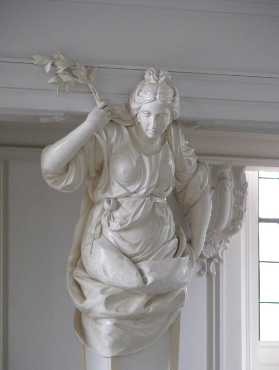 Ludwigskirche in Saarbrücken, Germany: Karyatide von Carlo Luca Pozzi (* 19. Oktober 1734 in Bruzella; † 12. Dezember 1812 in Castel San Pietro TI) dem Schweizer Stuckateur.